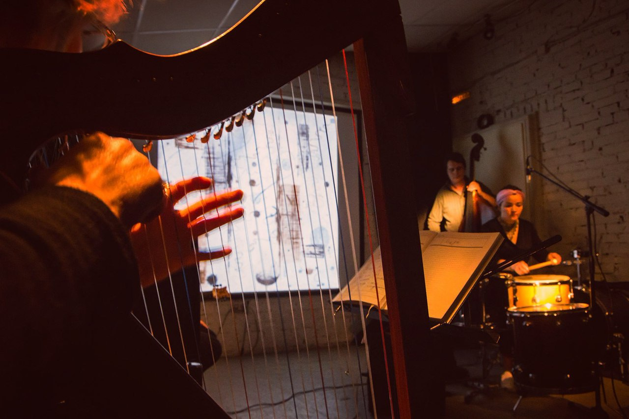 выпускной концерт